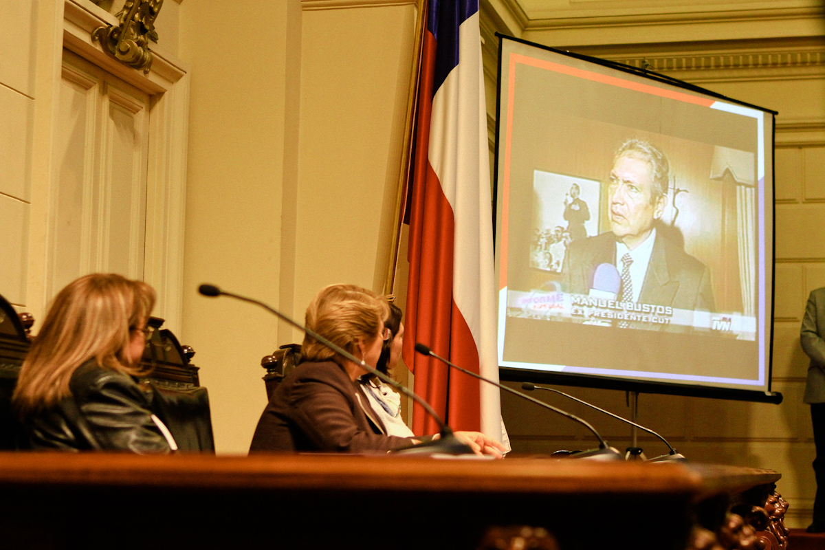 Homenaje Manuel Bustos Ex Congreso 26/09/2013